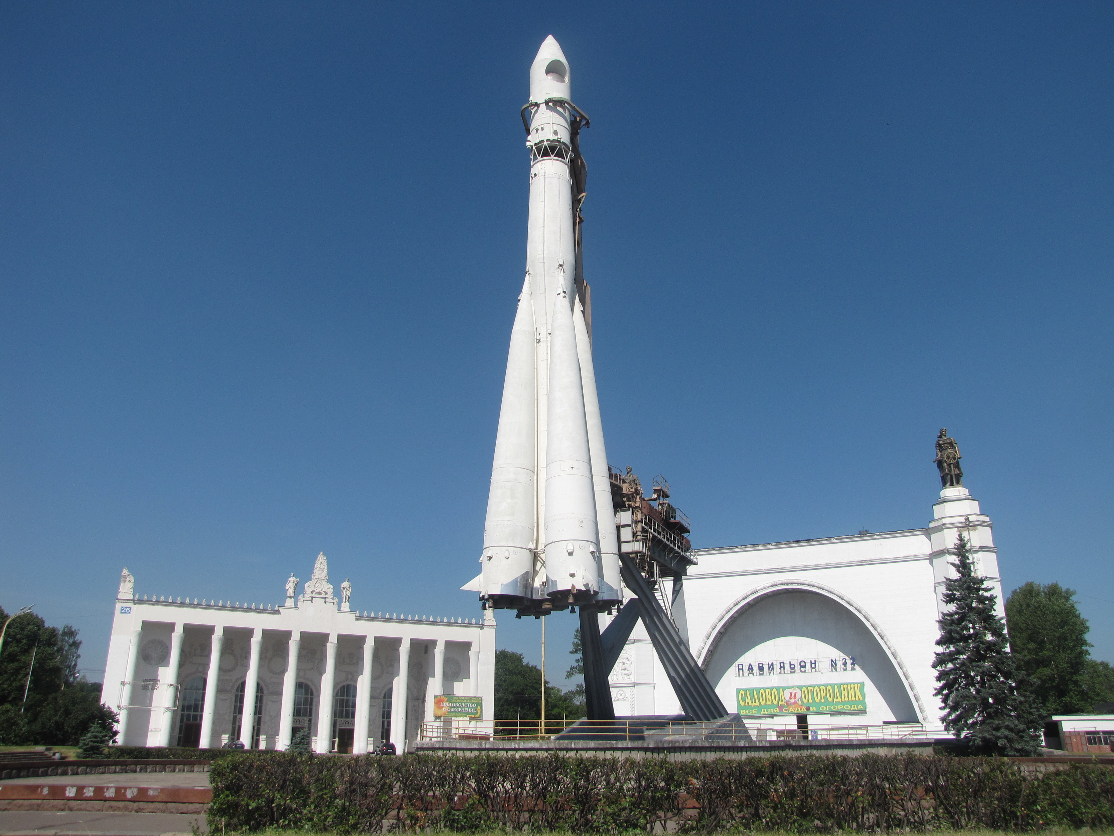 Ансамбль площади промышленности (Механизации) уникален но разрознен, но главные его символы - три павильона - Механизация, Животноводство, Земледелие, Ракета и два самолёта - одно их самых притягательных мест на ВДНХ.